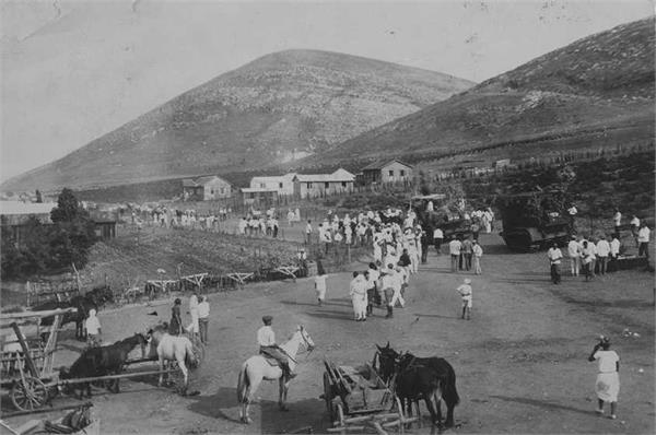 חגיגת ביכורים בעין חרוד